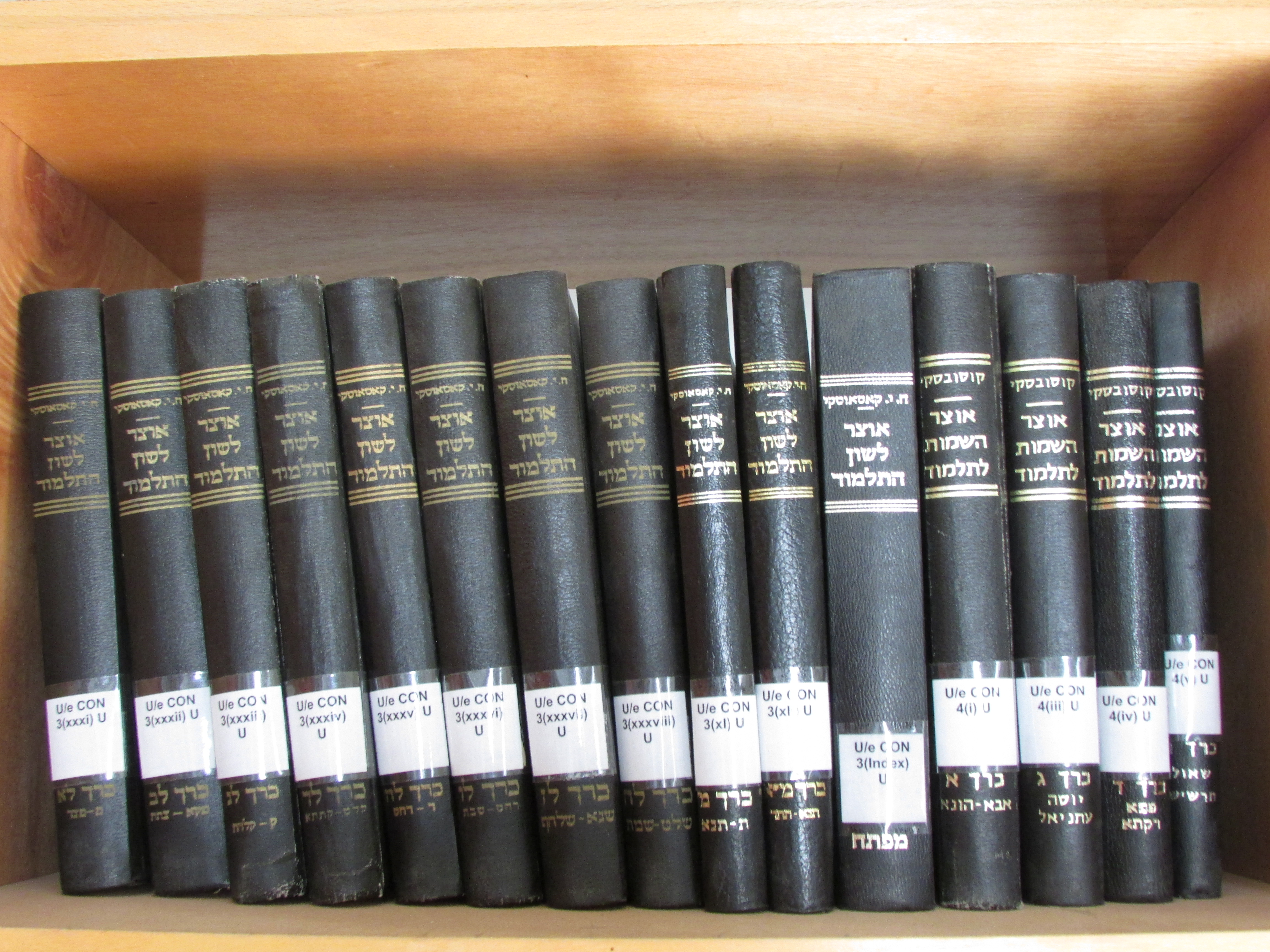 Rockefeller Museum library